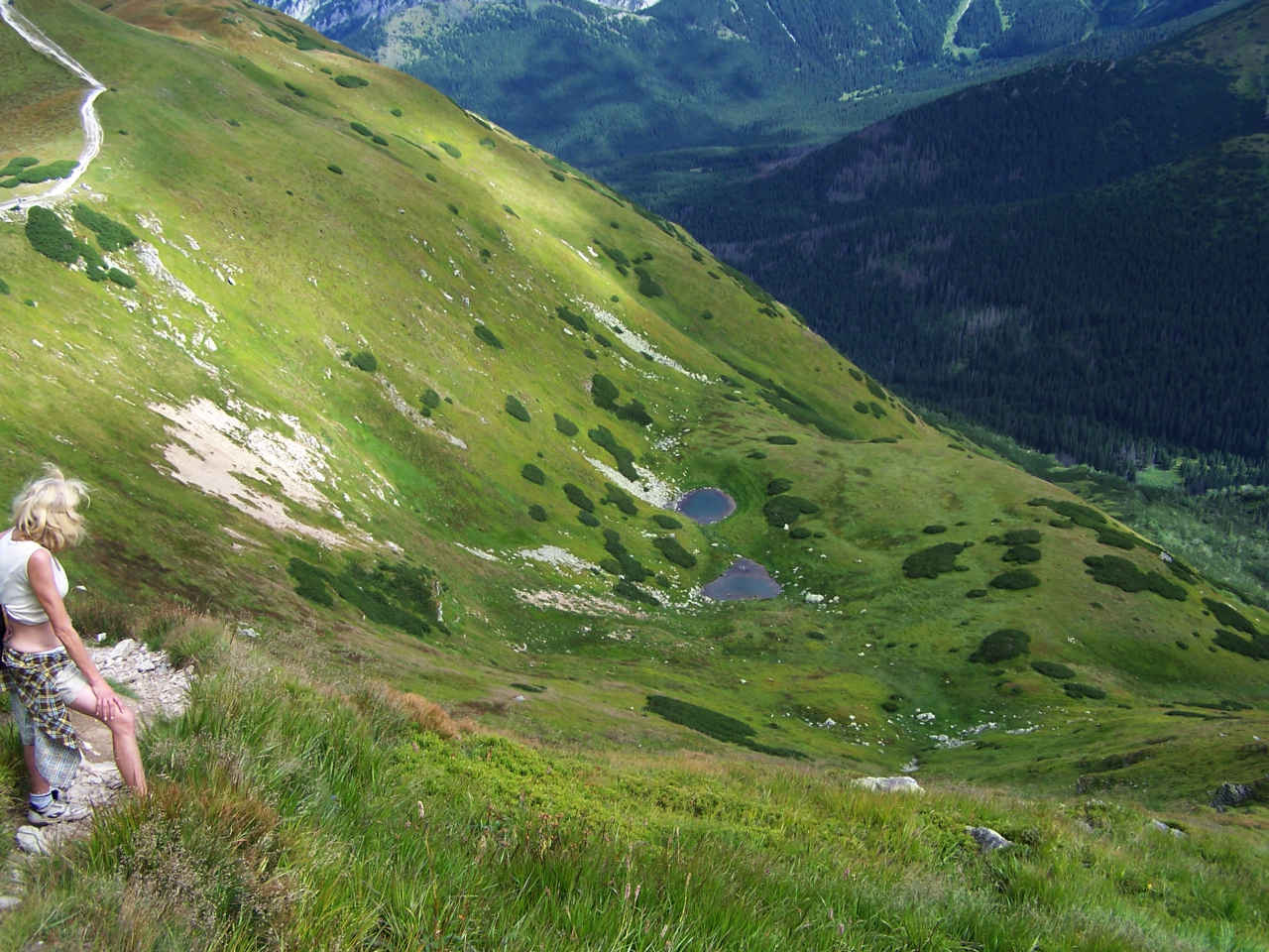 Siwe Stawki(Tatra Mountains, Dolina Pyszniańska)